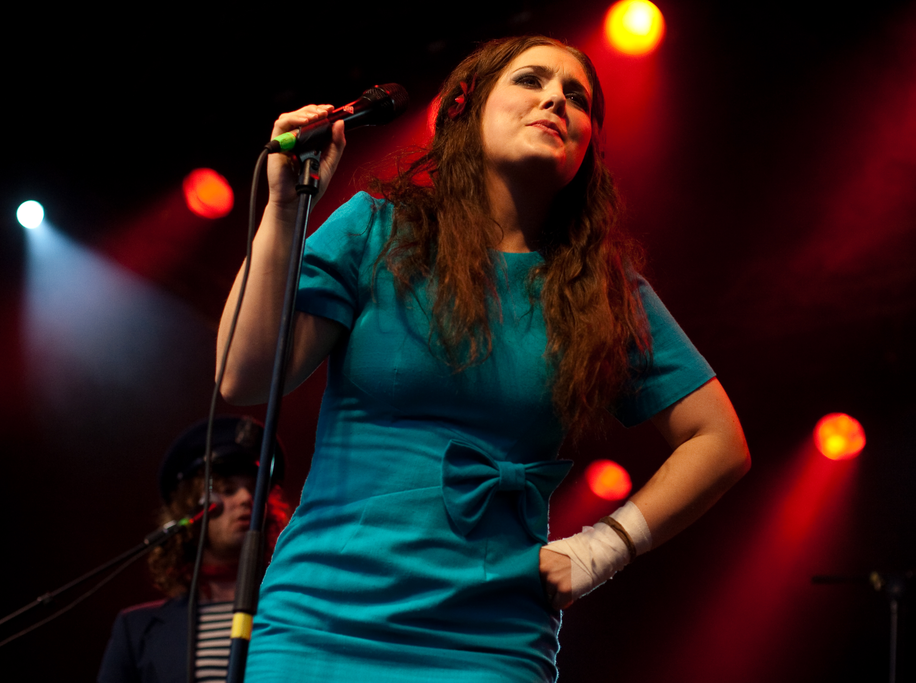 Miss Li live during Trästockfestivalen in Skellefteå, Sweden, 17 July 2009